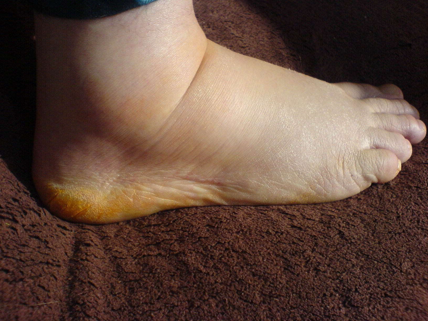 Geschwollener menschlicher Fuß ♂